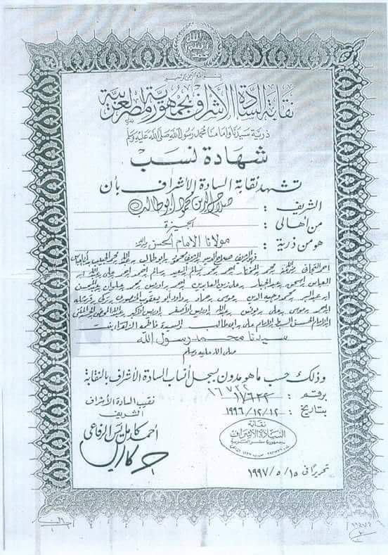 شهادة نسب الشيخ صلاح الدين التجاني صادرة عن نقابة الأشراف المصرية